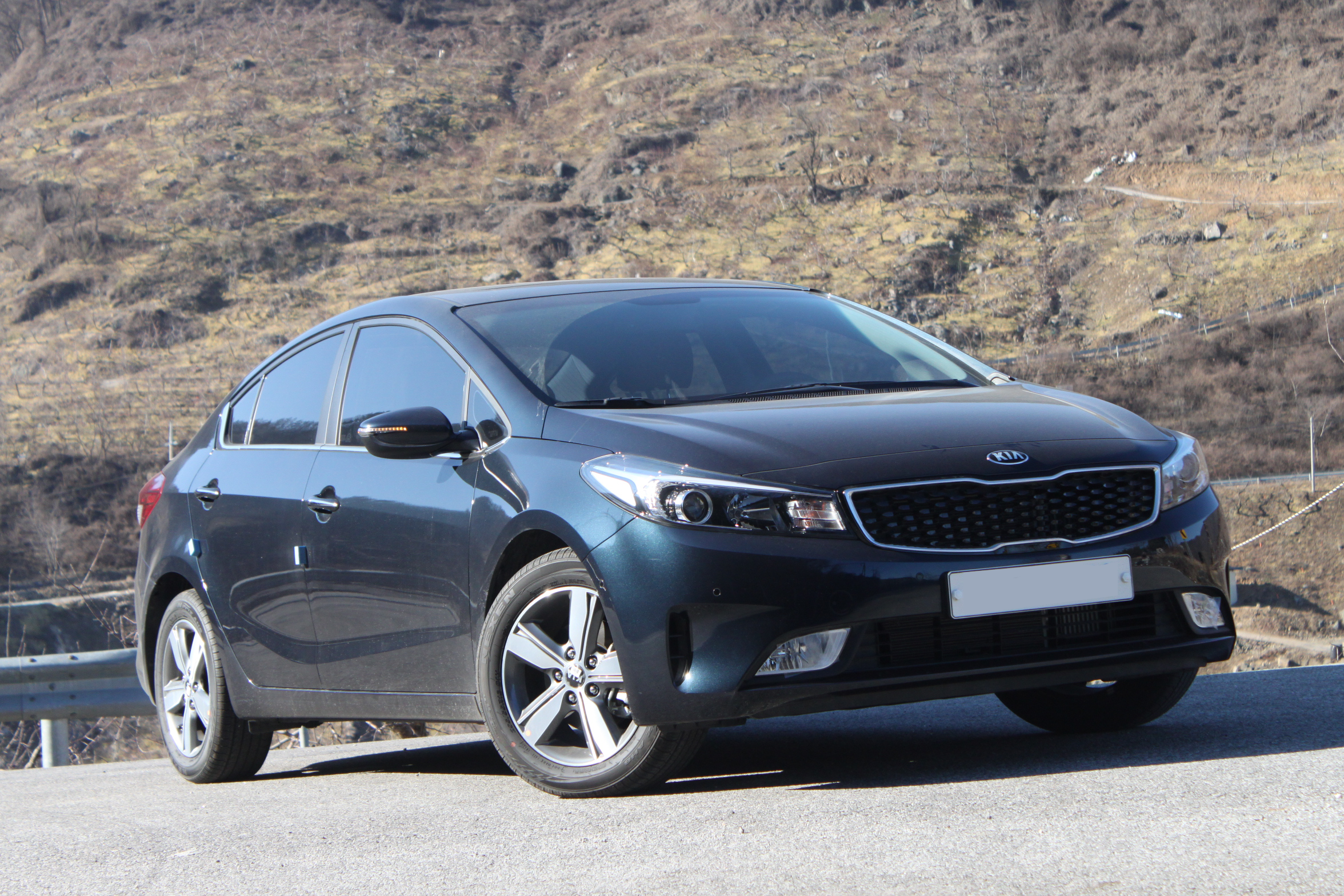 기아 더 뉴 K3 정측면